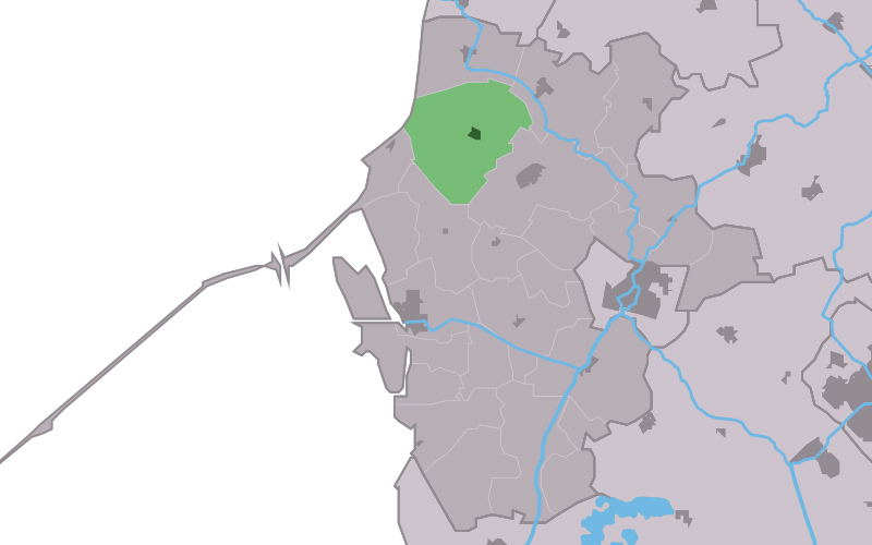 Kaartsje fan himrik fan Penjum